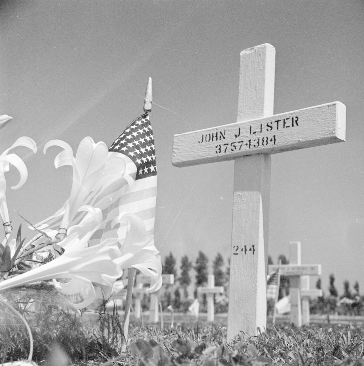 In Margraten ligt op een heuvel een Amerikaanse militaire begraafplaats. In de nazomer en winter van 1944, in Zuid-Limburg en tijdens het Ardennenoffensief in de Ardennen en in het Ruhrgebied zijn duizenden soldaten gesneuveld. Van de oorspronkelijk 18.764 gesneuvelde Amerikaanse soldaten is een groot gedeelte gerepatrieerd naar het land van herkomst. Er liggen in totaal 8.301 Amerikanen begraven in Margraten. Op de "Wall of the Missing" staan de namen vermeld van 1722 Amerikaanse soldaten die vermist zijn tijdens de Tweede Wereldoorlog. De Nederlandse regering heeft de grond uit eerbied en dankbaarheid eeuwigdurend afgestaan aan de VS. John J Lister killed in action on 7 april 1945 - 48 Infantry Batalion - 7th Armored Division - C-compagny Collectie: Nationaal Archief / Fotocollectie Anefo Fotograaf: Noske, J.D. Datum: 31-05-1947 Bestanddeelnummer 902-1907 Original at Nationaal Archief with id